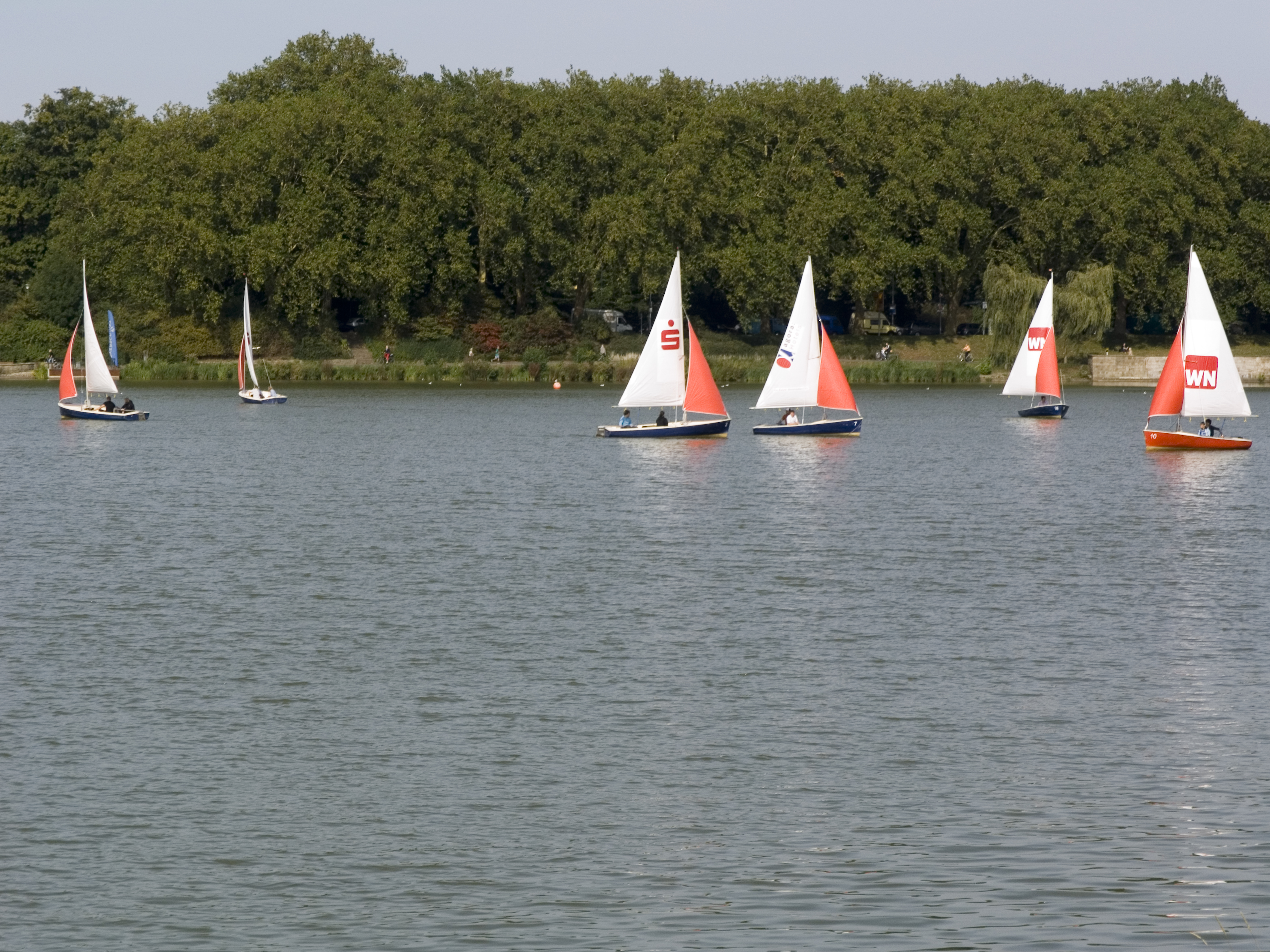 Северный Рейн - Вестфалия, Мюнстер - водохранилище Аазее